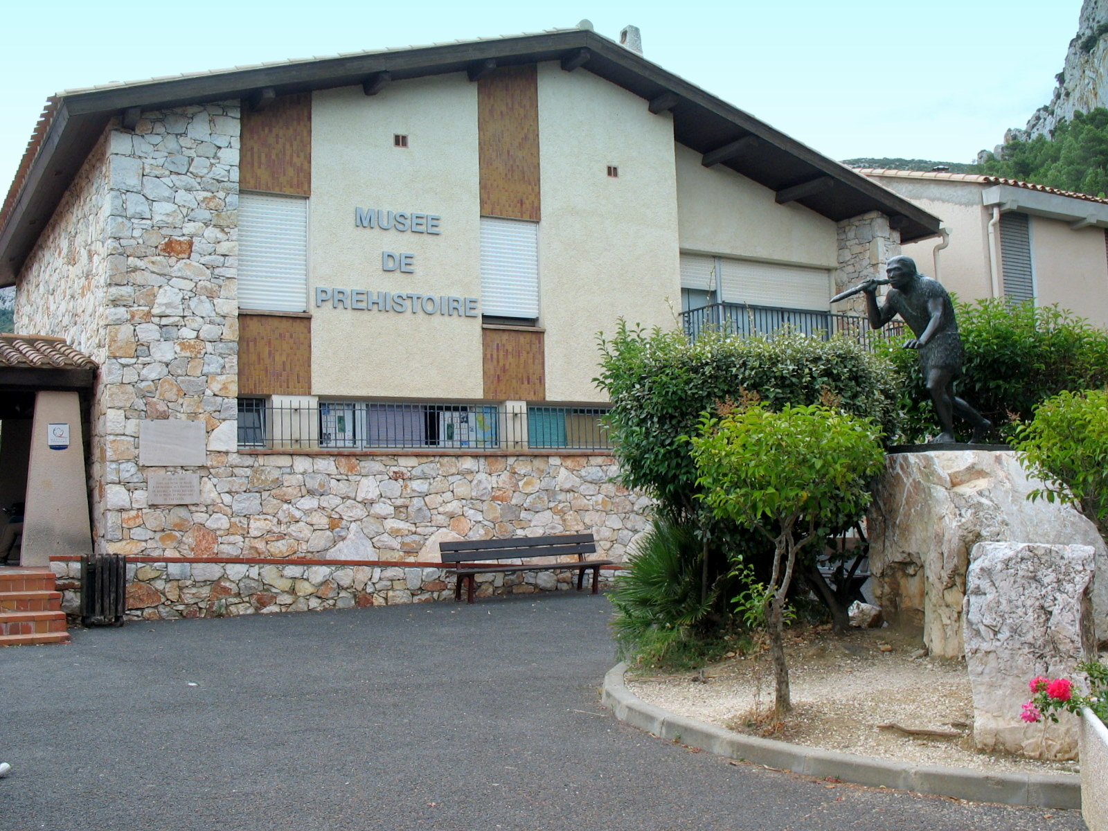 Fachada del Museo de la Prehistoria (Musée de Préhistoire) de Tautavel (Francia)